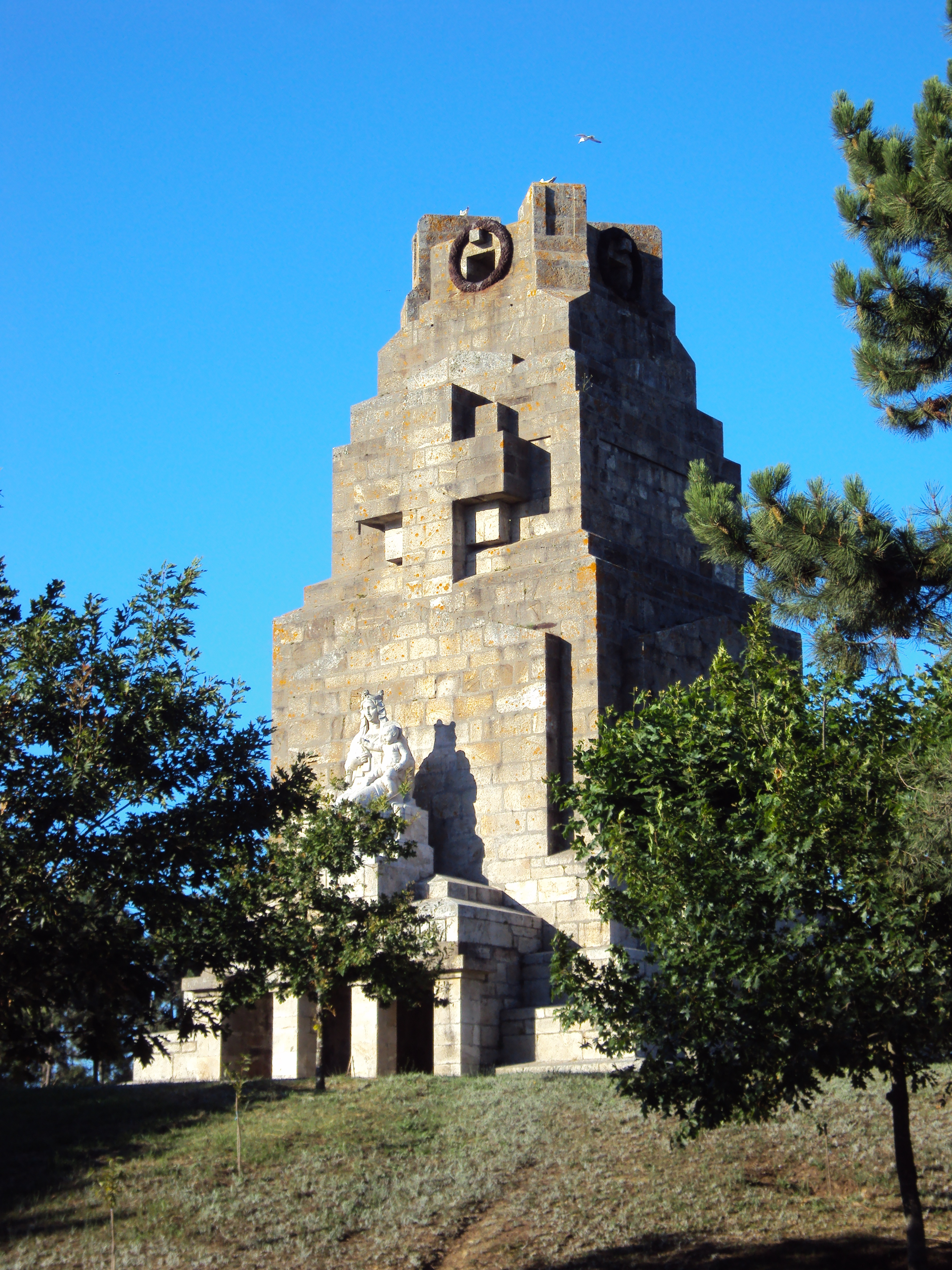 Monumento á Mariña Universal, Monteferro, Panxón, Nigrán.